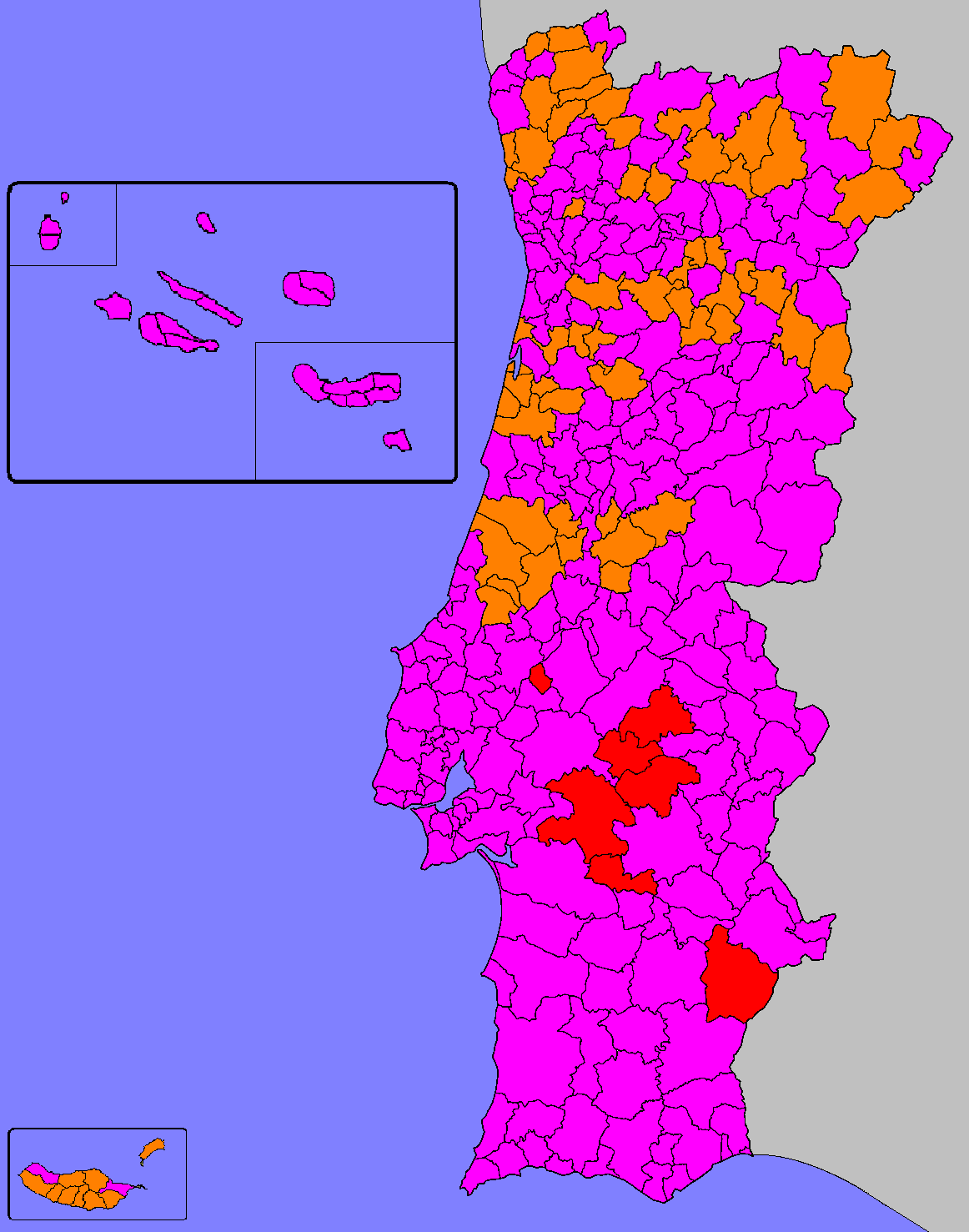 Demonstração ilustrativa do partido vencedor por concelhos nas Eleições Europeias de 2019 em Portugal